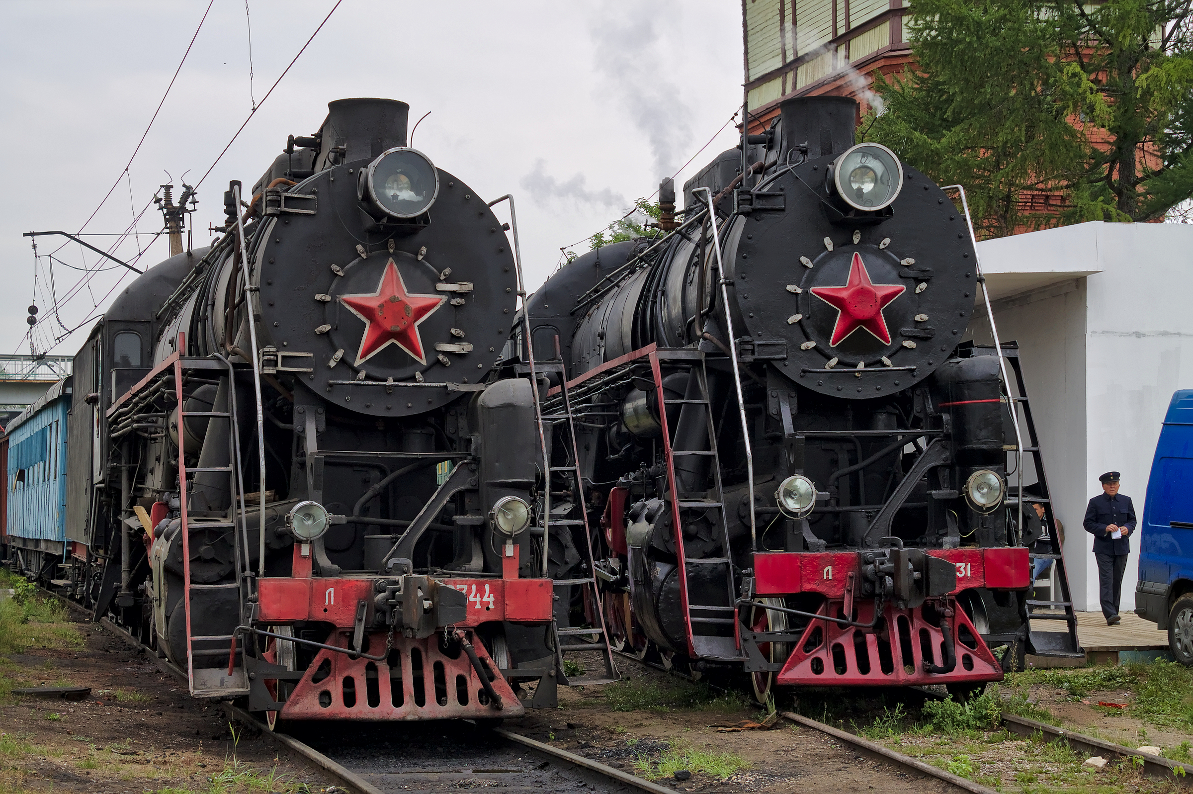 Л-2344 и Л-2331, Москва, депо Подмосковная. см. фото 631864 в альбоме автора